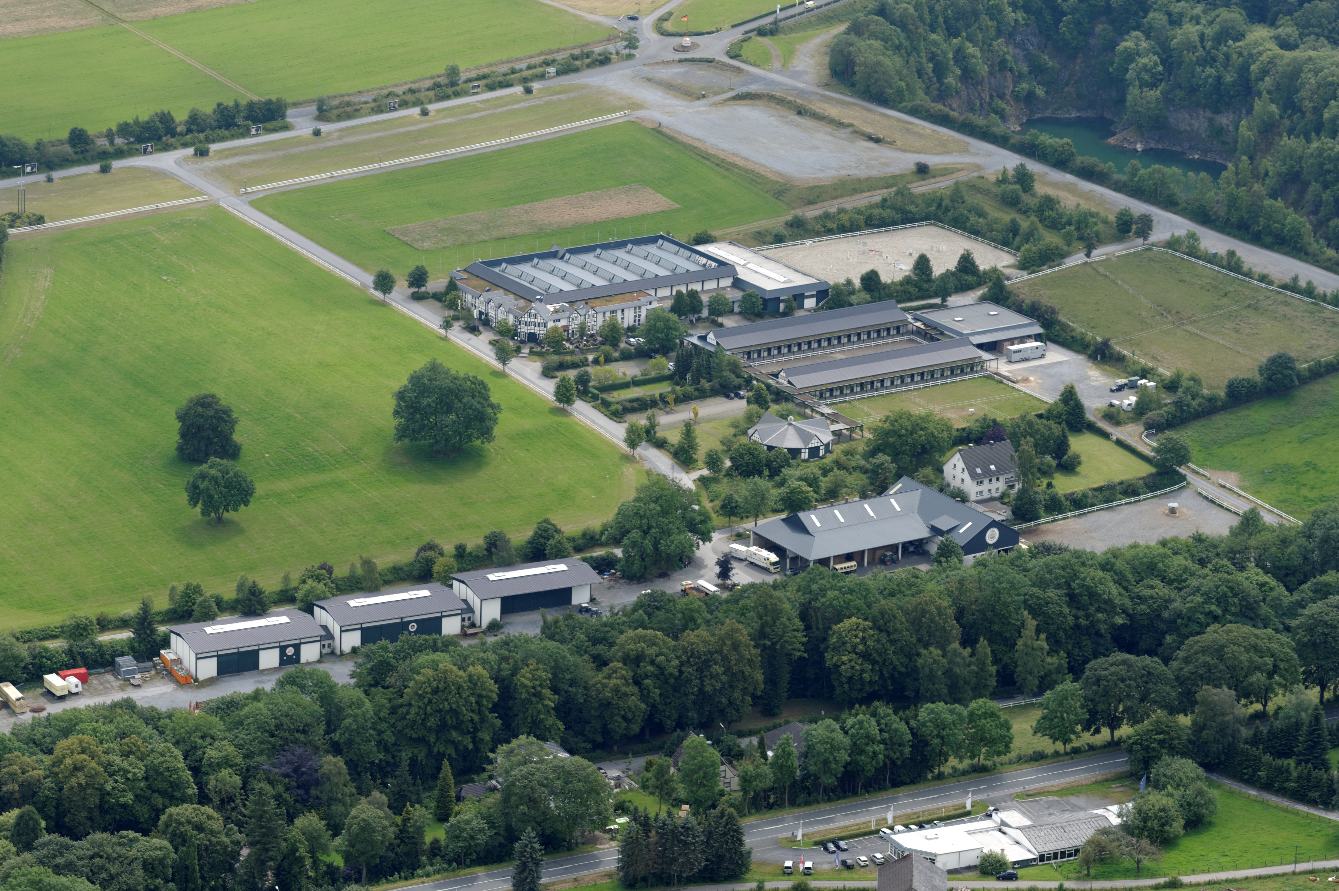 Fotoflug Sauerland Nord. Warstein, Warsteiner Brauerei The making of this document was supported by the Community-Budget of Wikimedia Germany.